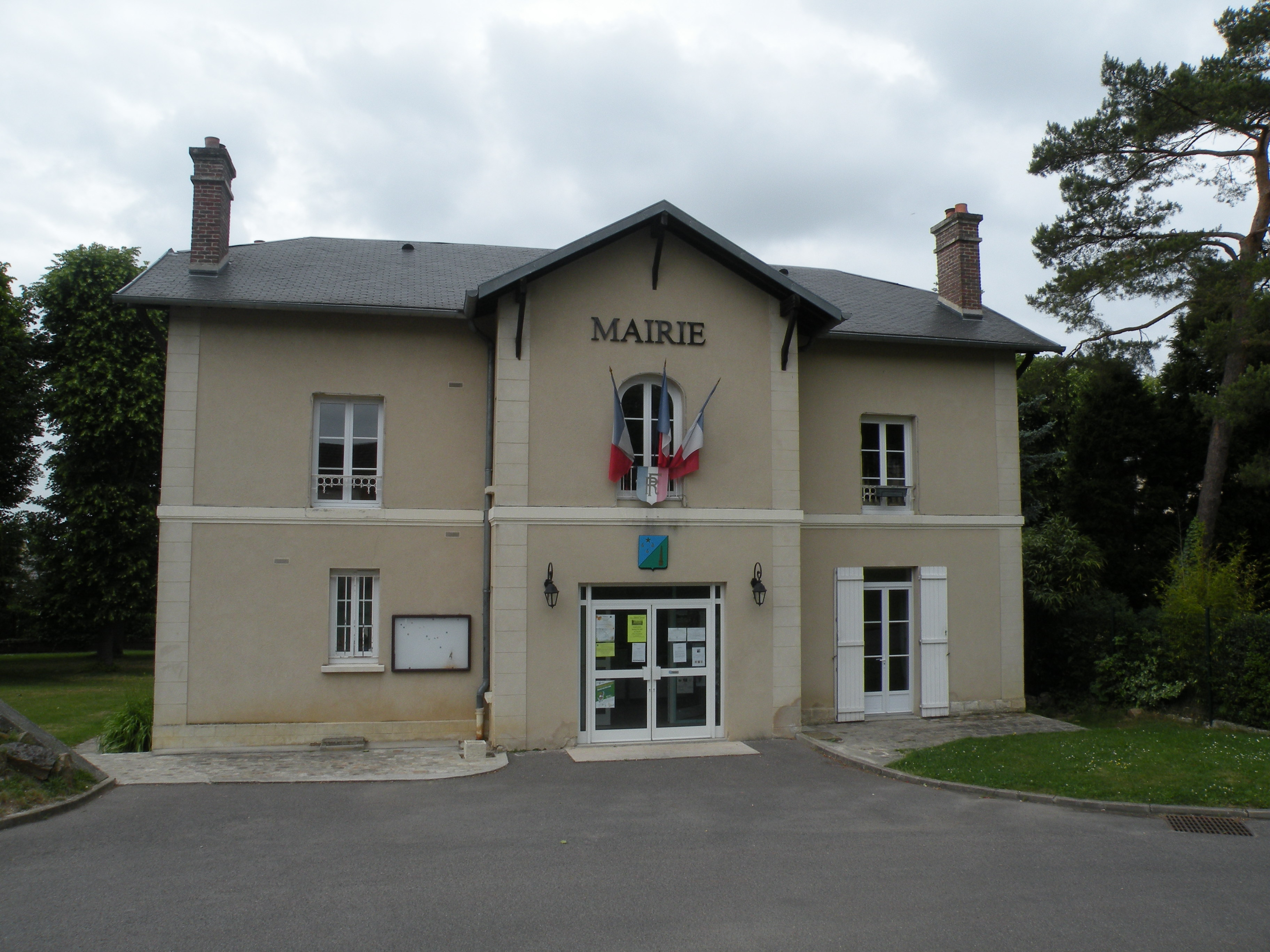 mairie de Nointel (Val-d'Oise)